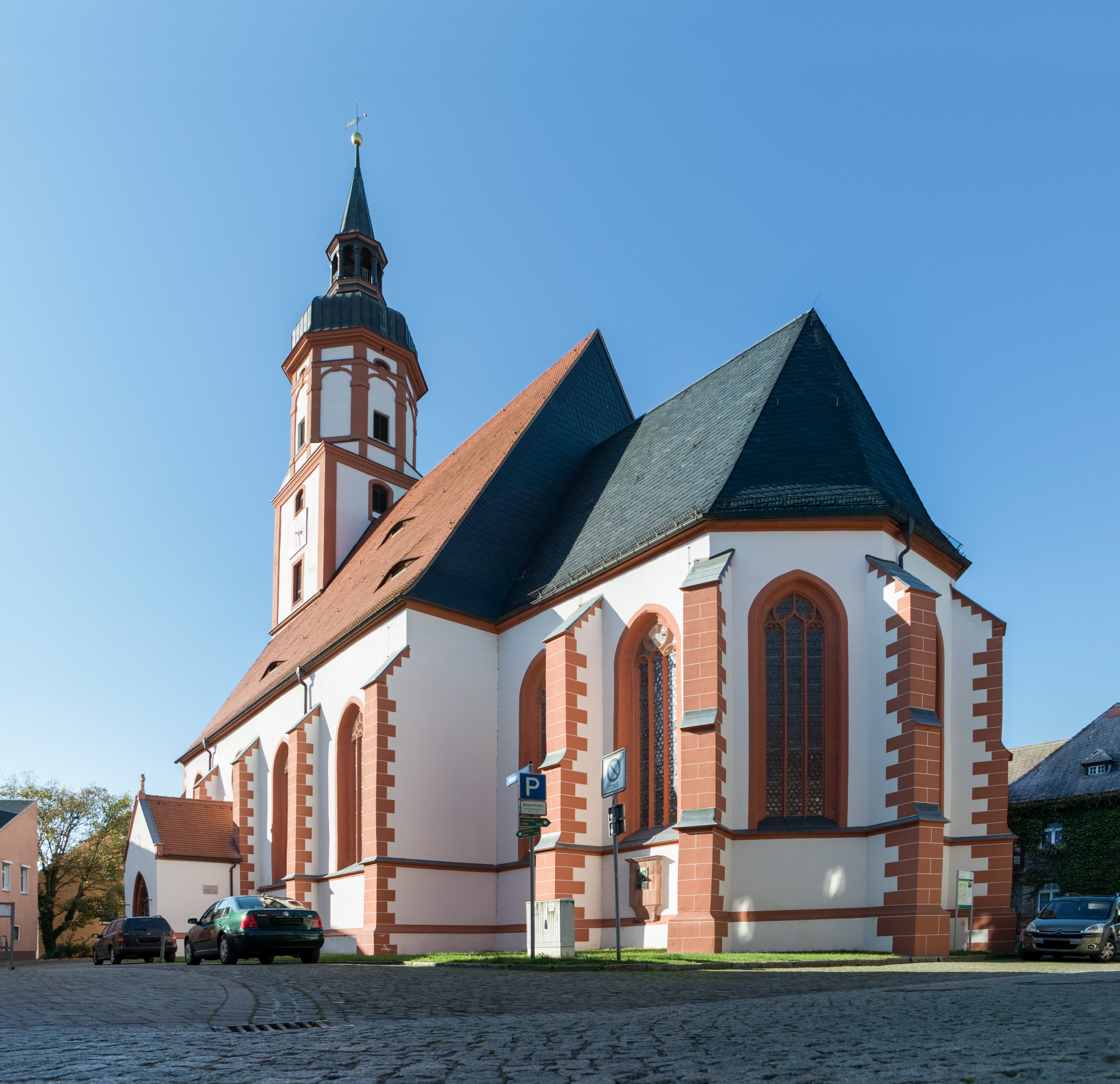 Stadtkirche St. Johannis, Johanniskirchhof in Mügeln